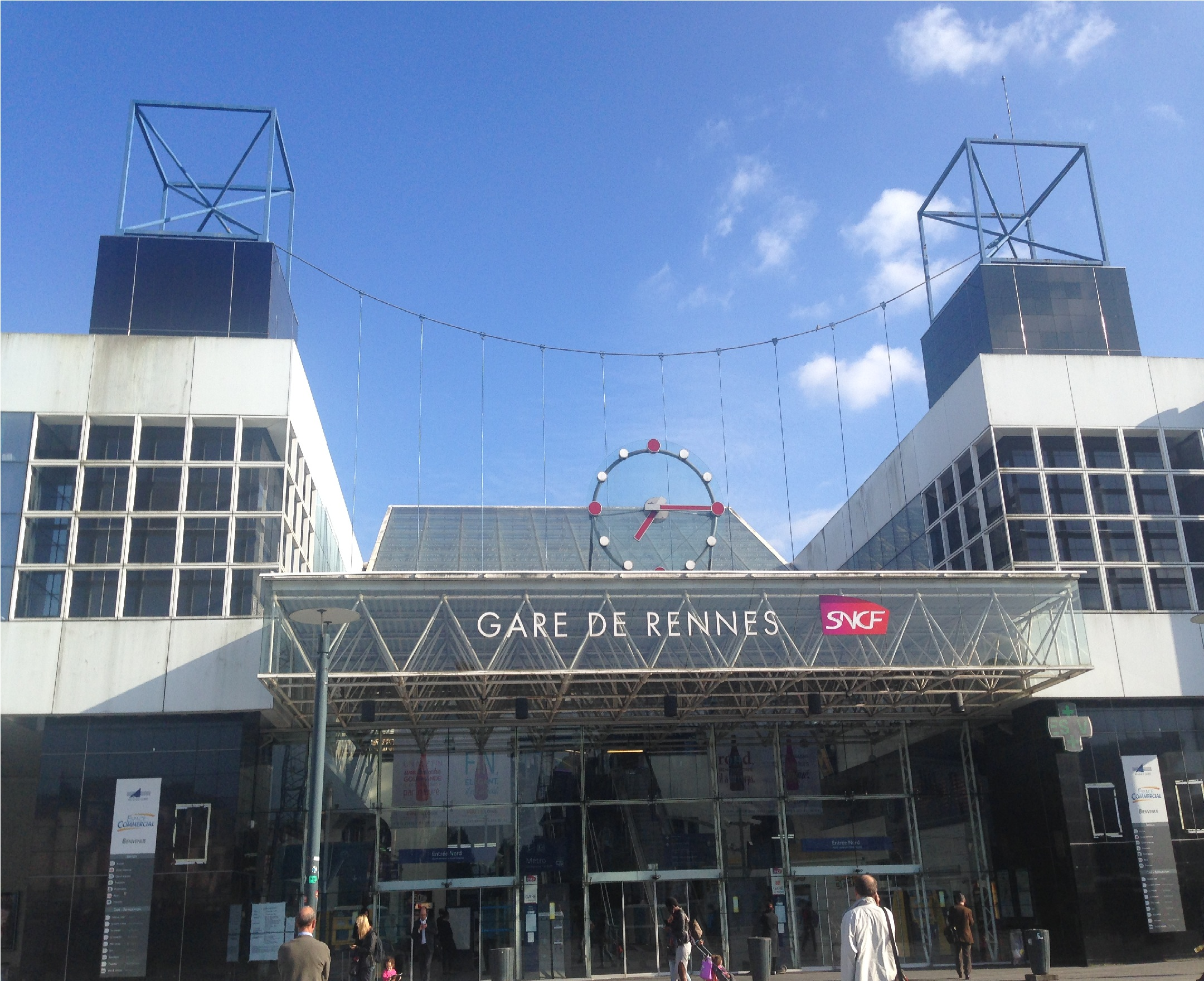 雷恩火车站正门（北广场）